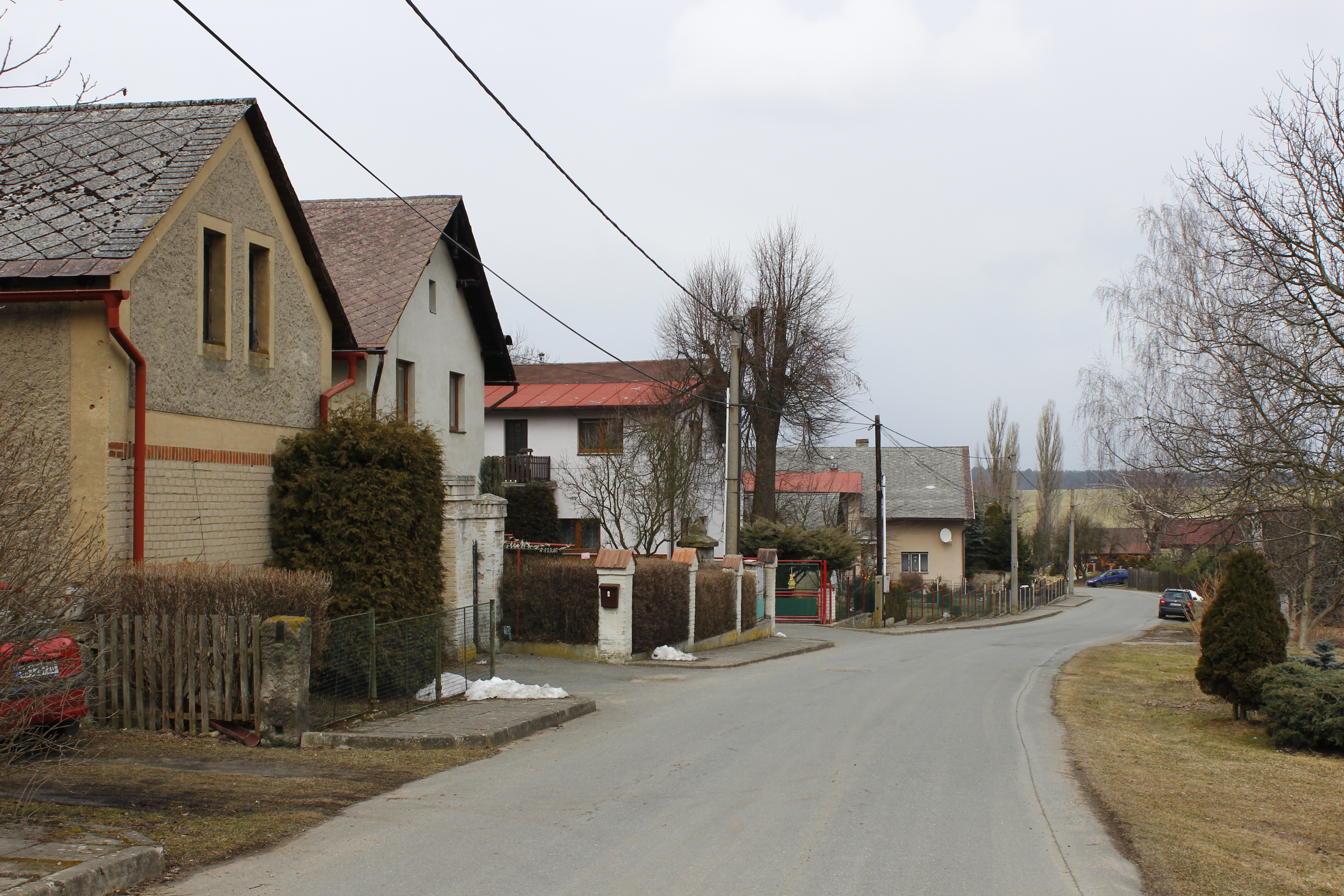 Zástavba ve Valovicích (pohled k severovýchodu).